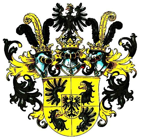 Wappen der Grafen von Pückler, Freiherren von Groditz.